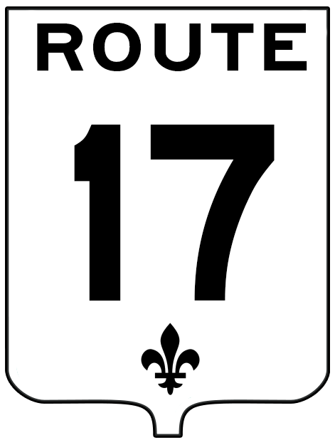 Signalisation de l'ancienne route québécoise 17